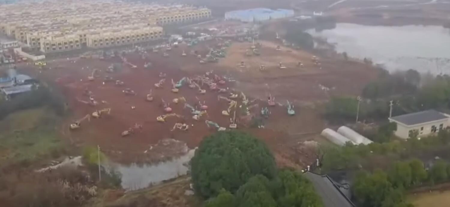 在建的武汉火神山医院